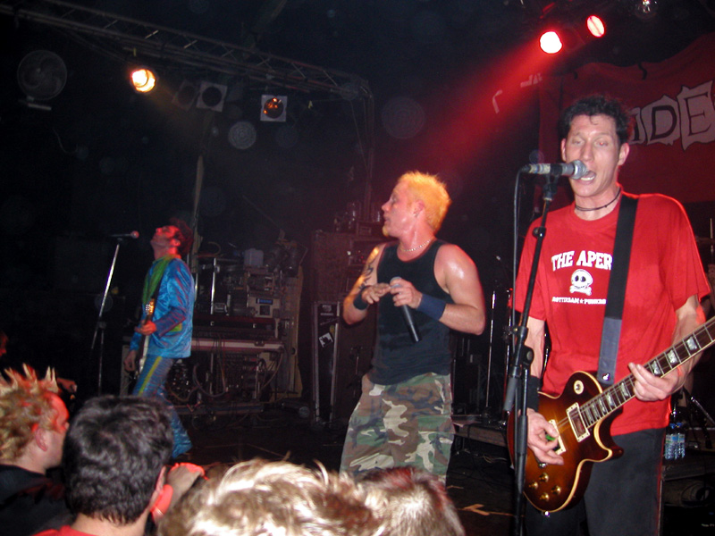 De Heideroosjes im Februar 2002 im Old Backstrage / München (zudem das letzte Konzert im Old Backstage). Selbst aufgenommen.